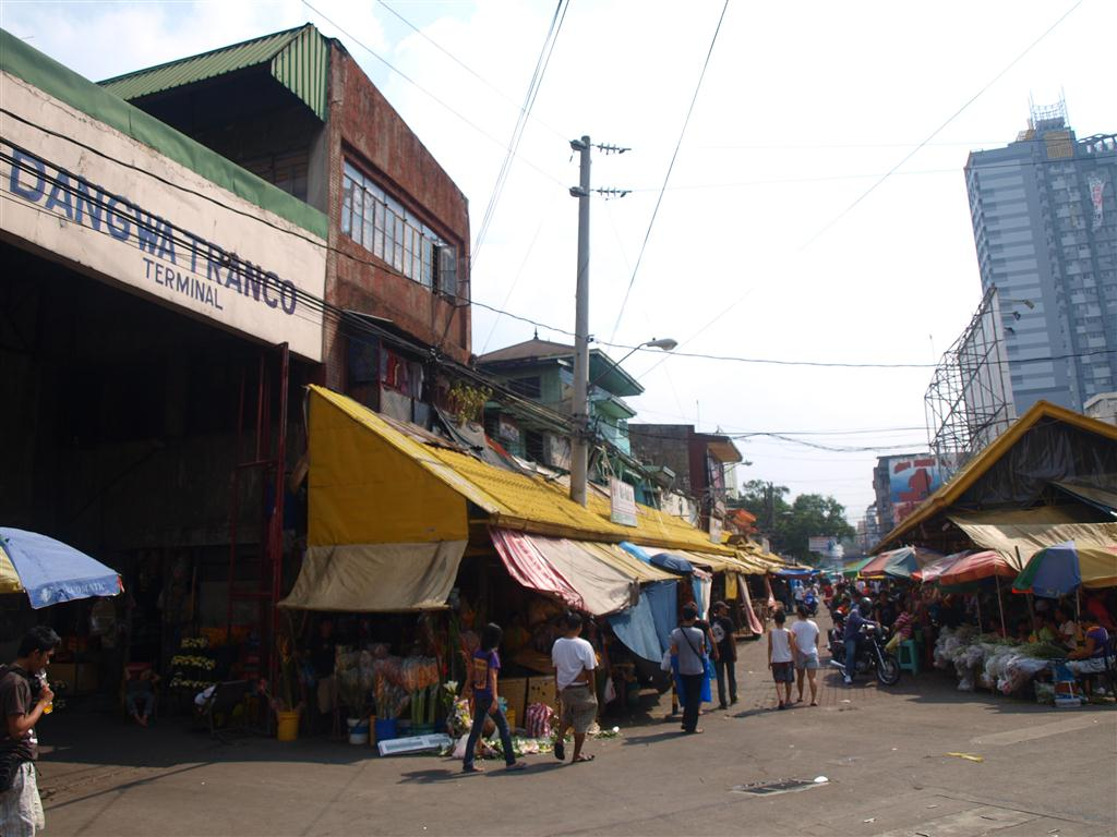 Dangwa flower market in Manila, Philippines